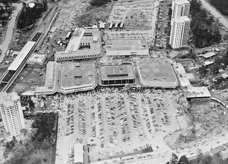 Farsta centrum från ovan vid invigningen den 23 oktober 1960